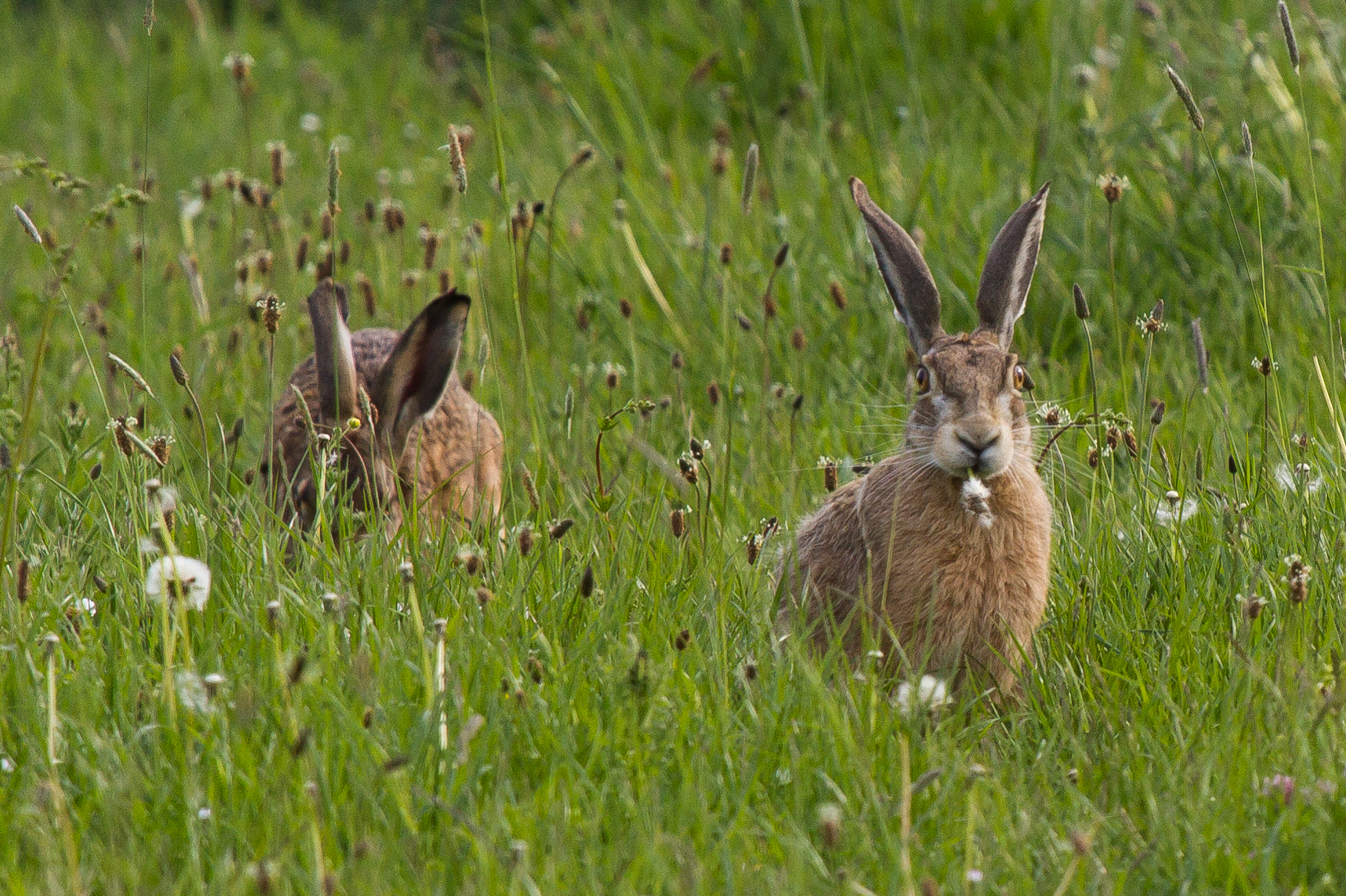 Feldhasen an der Flutmulde, NSG Bislicher Insel; noch gibt es sie im NSG